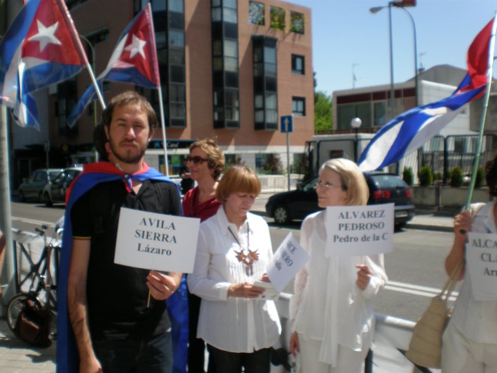 Manifestacio por liberigado de la kubaj disidentoj de la Nigra Printempo, en Madrido, Hispanio.